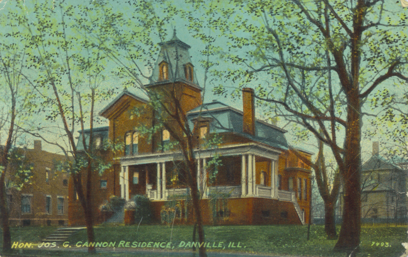 Postcard depicting Joseph G. Cannon's residence in Danville Illinois circa 1913